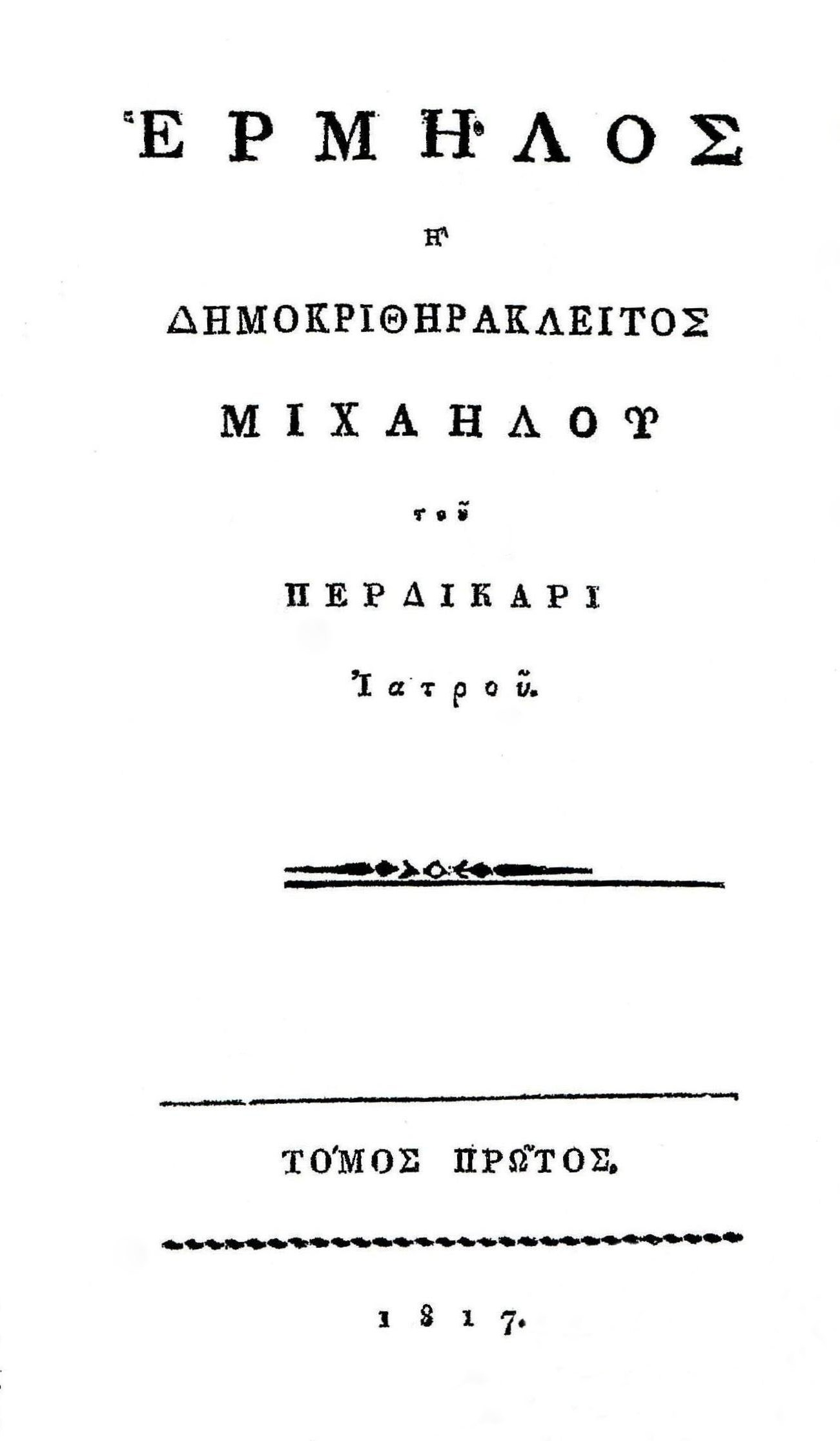 Το εξώφυλλο του έμμετρου μυθιστορήματος του Μ. Περδικάρη, που τυπώθηκε το 1817.